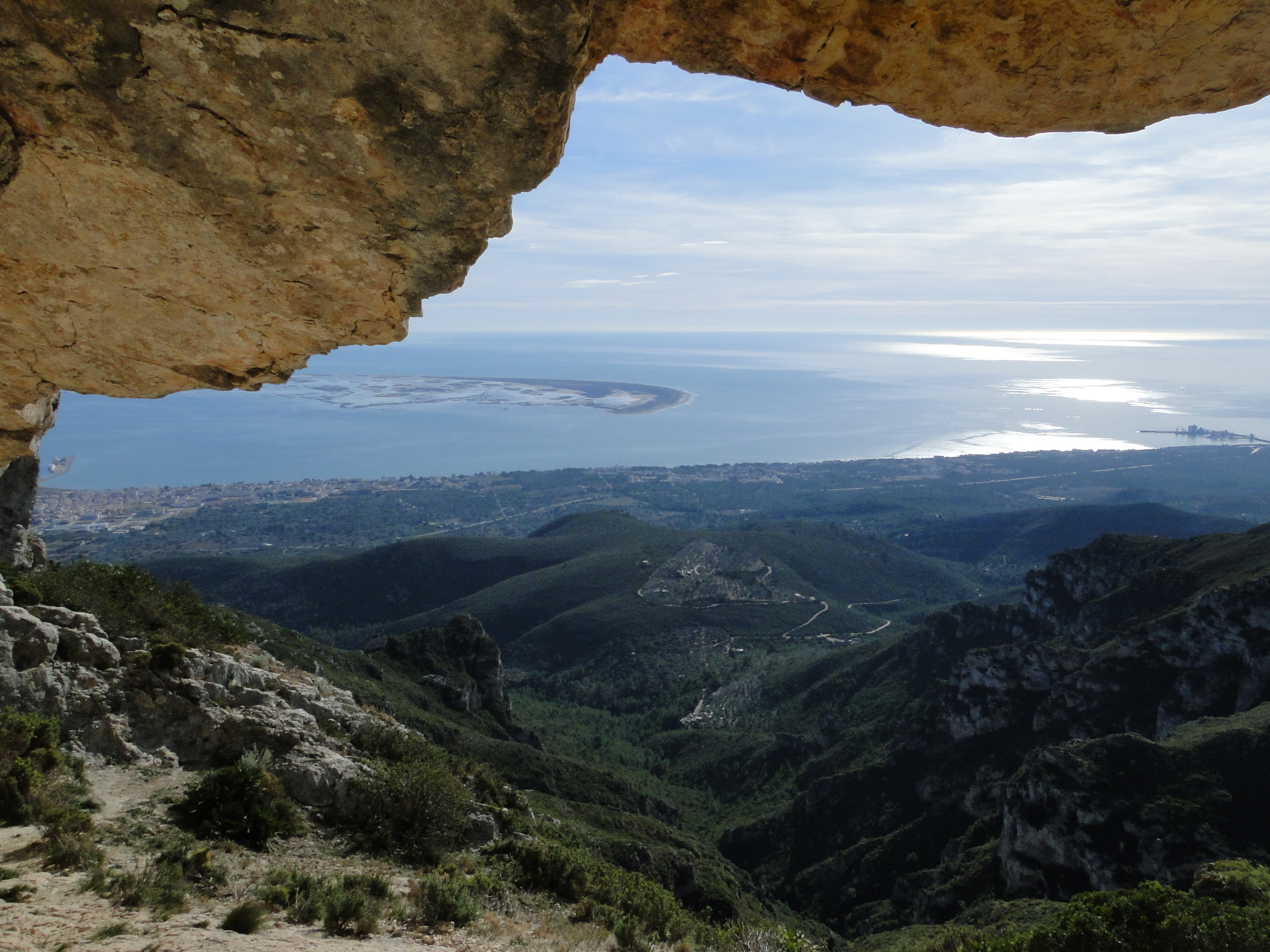 La Punta de la Banya vista des de La Foradada